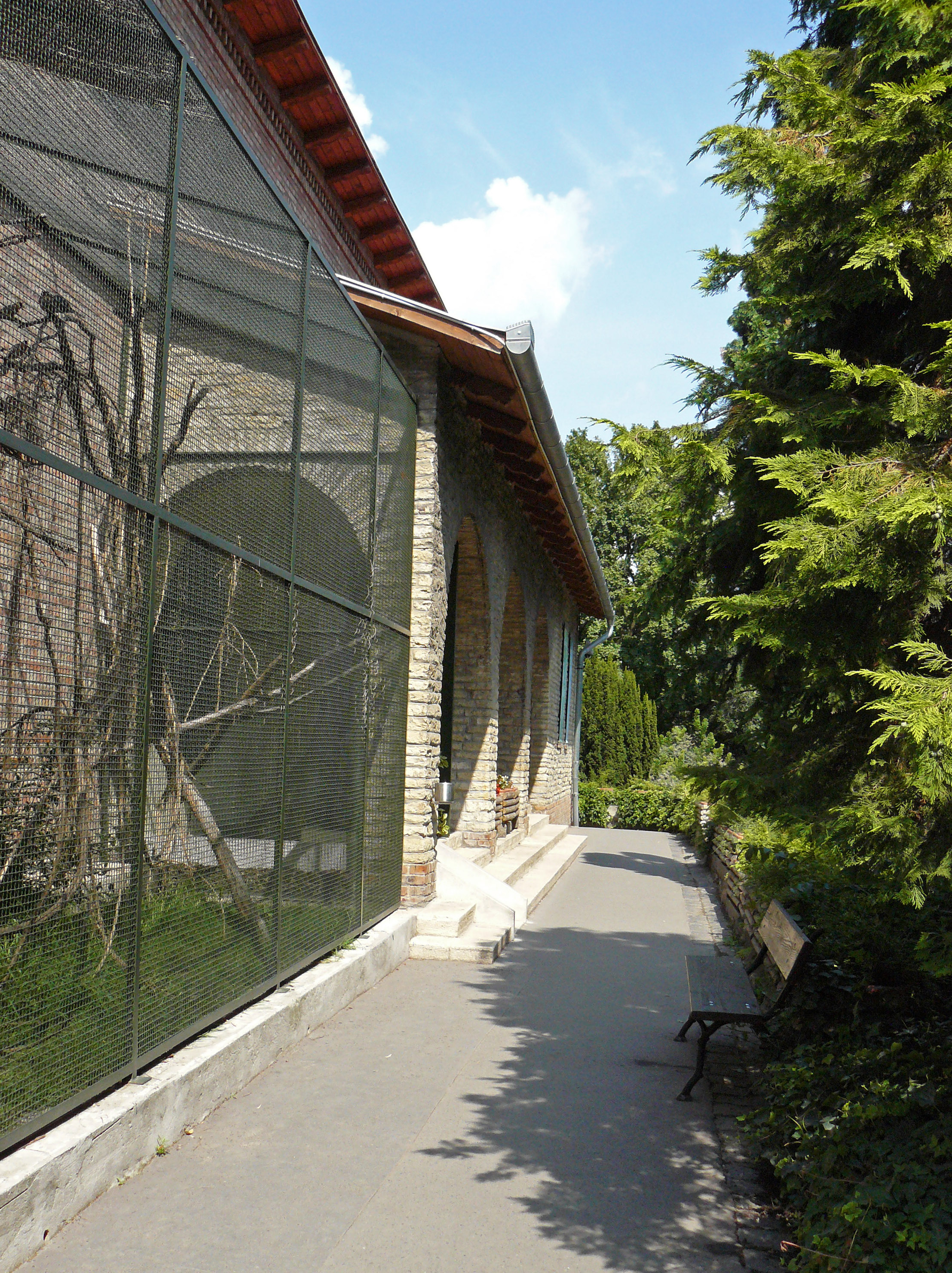 A budapesti Fővárosi Állatkertben lévő Xántus-ház